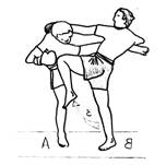 genou_remontant6.jpg